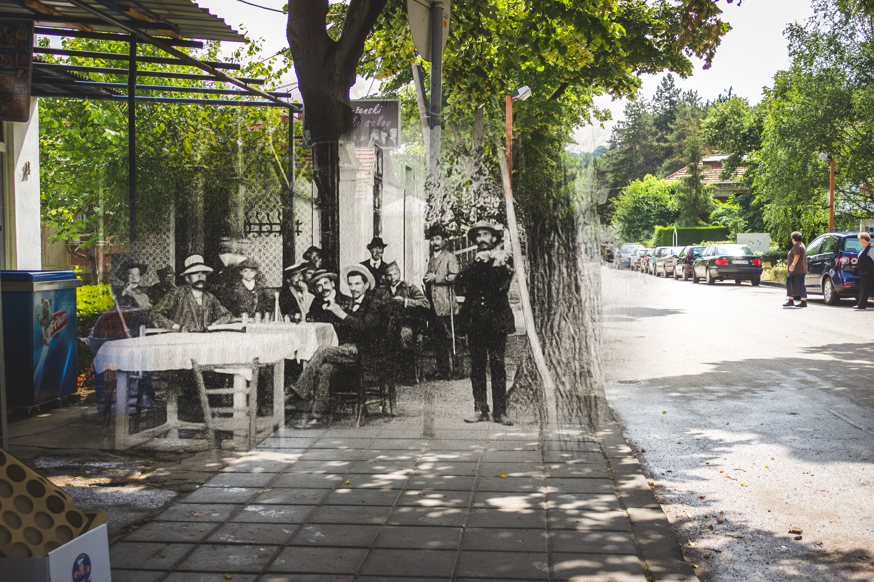 Srpski (latinica): Niška Banja, Nekadašnja kafana u ulici Trg Republike